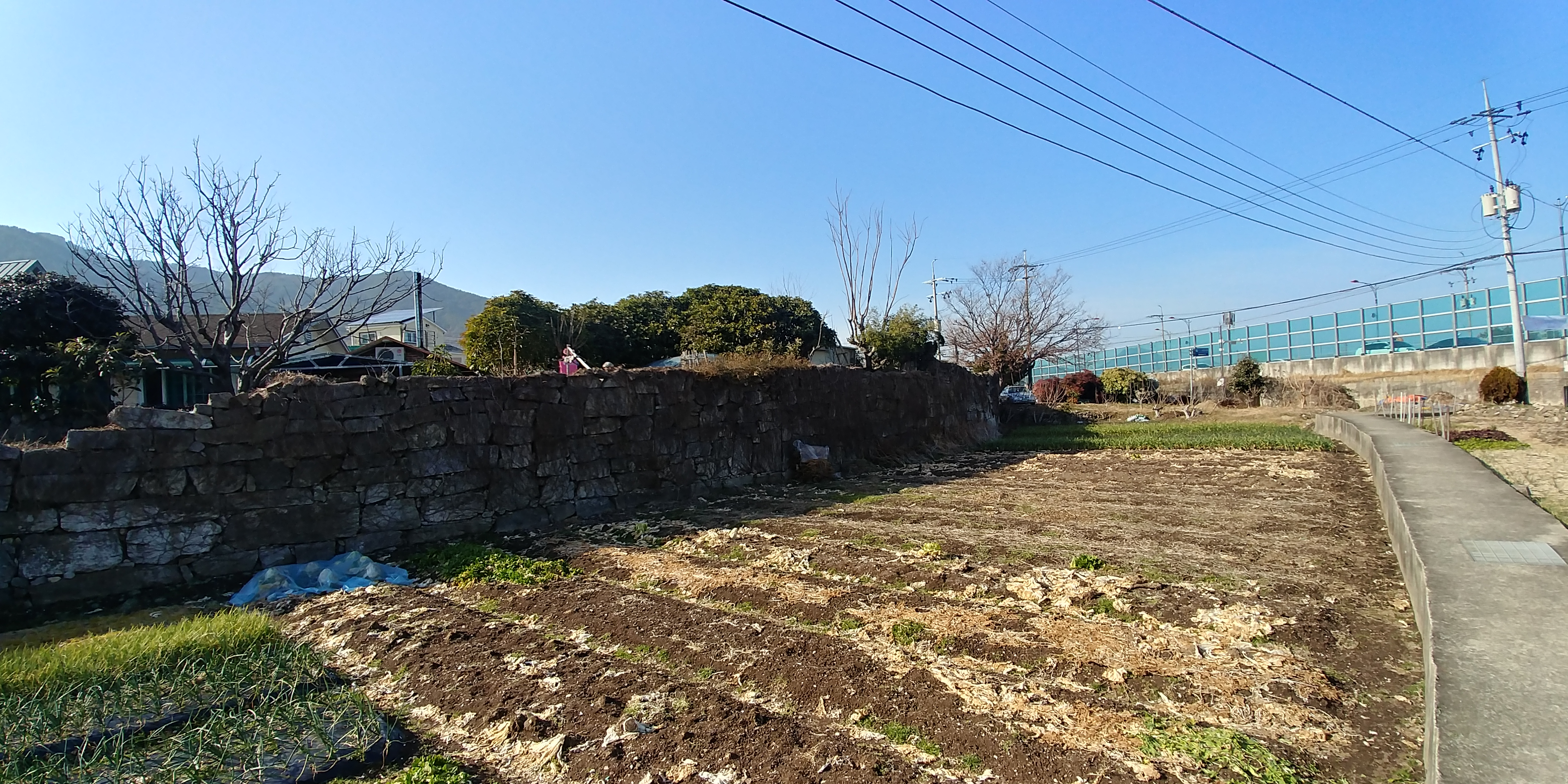 사등성터 왼쪽